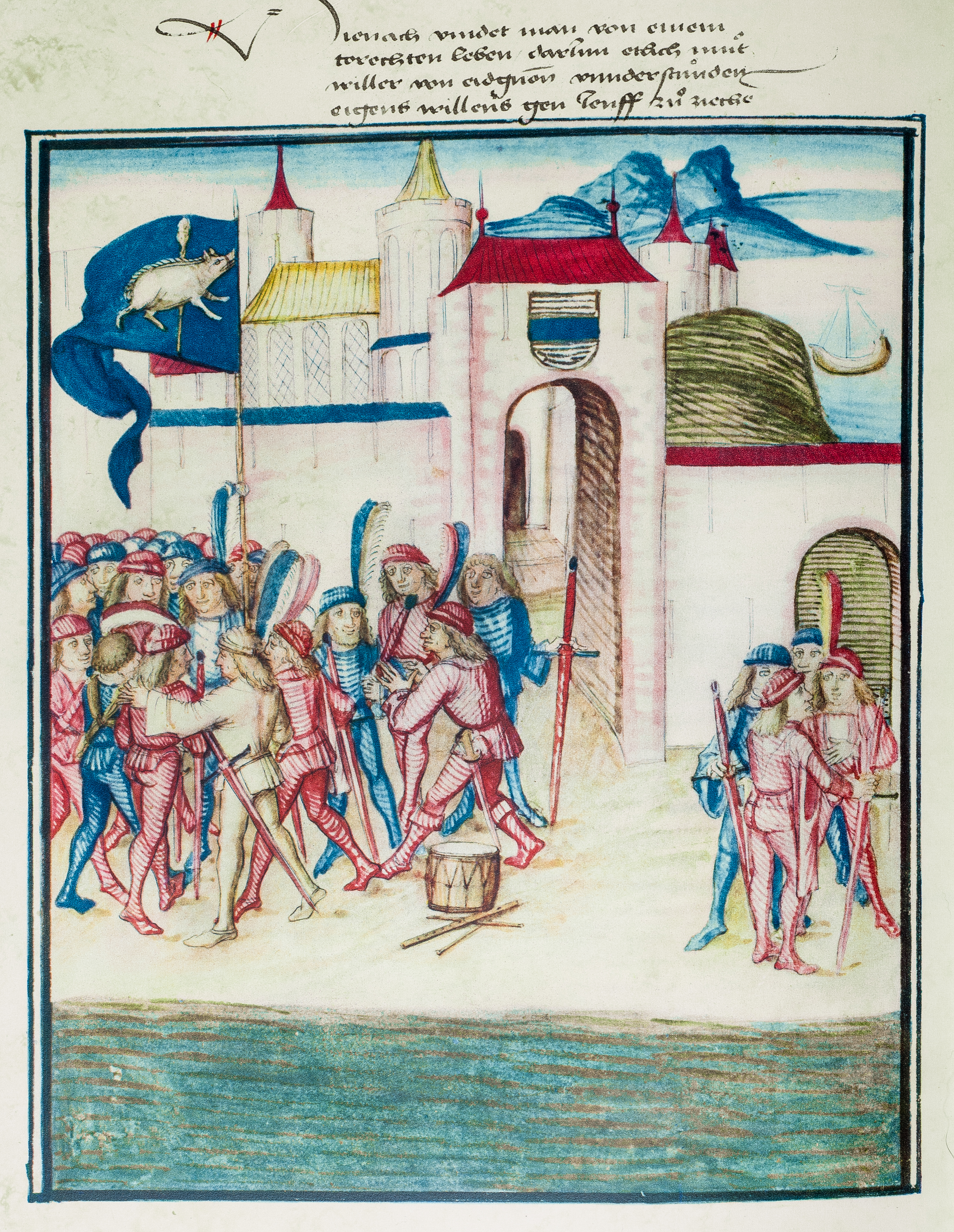 Die Brüder vom torrechten Leben sammeln sich nach der Rückkehr von der Schlacht bei Nancy in Zug unter dem blauen Banner mit Kolben und Sau (sog. "Saubannerzug"), 1477.